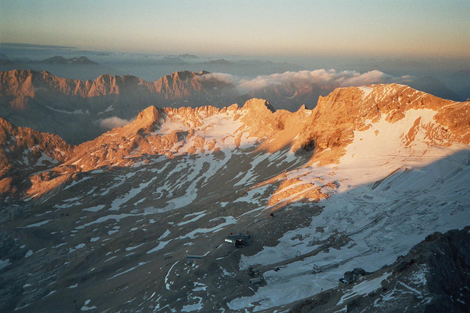 Selbst fotografiert im August 2005. Sonnenaufgang auf dem Gipfel der Zugspitze bei klarer Sicht. Blick in Richtung Österreichische Alpen. Unten sind der Zugpitz-Bahnhof Sonn Alpin auf dem Zugspitzplatt sowie die Forschungsstation Schneefernerhaus zu sehen.